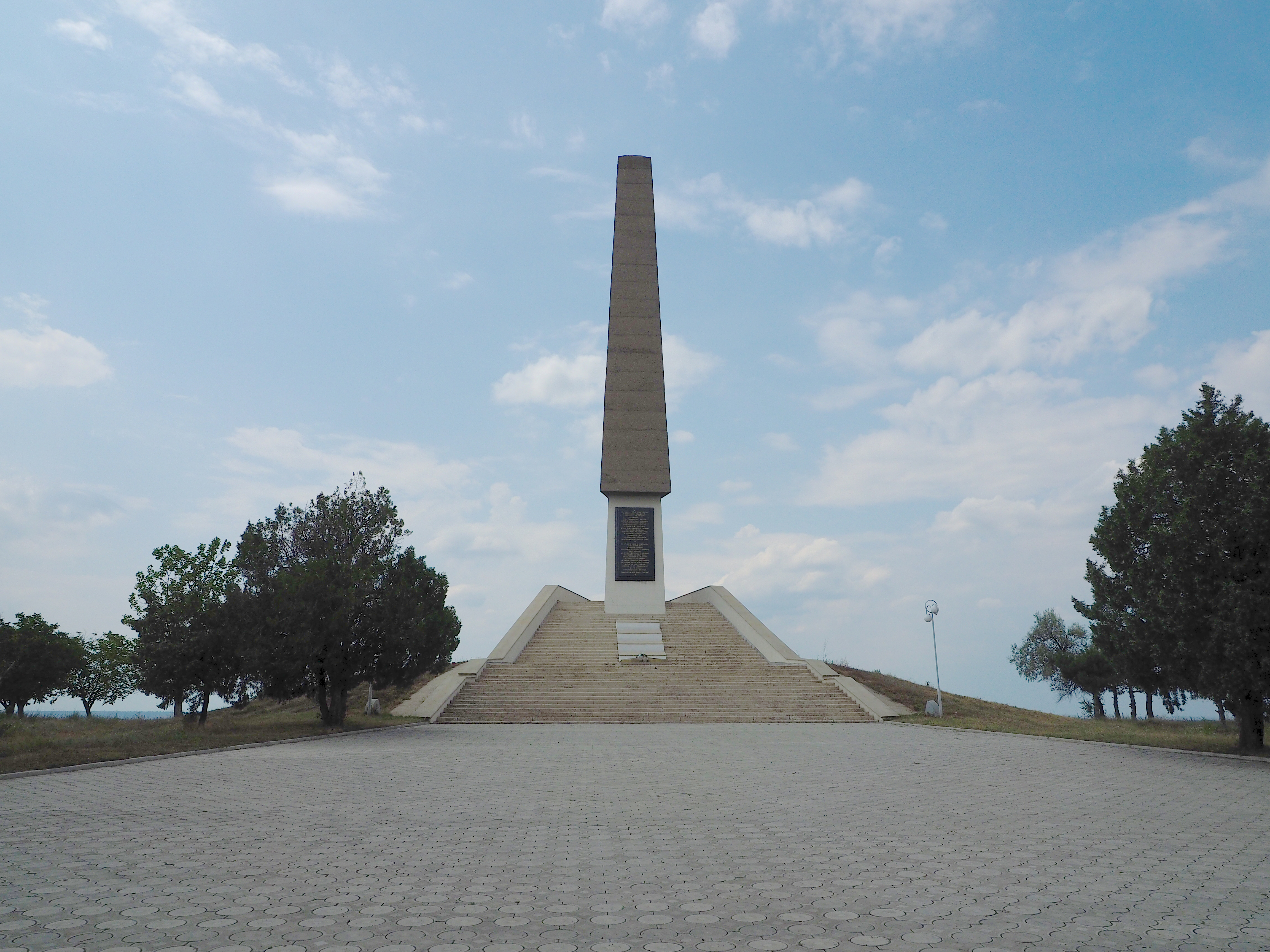 Памятник на Кицканском плацдарме.